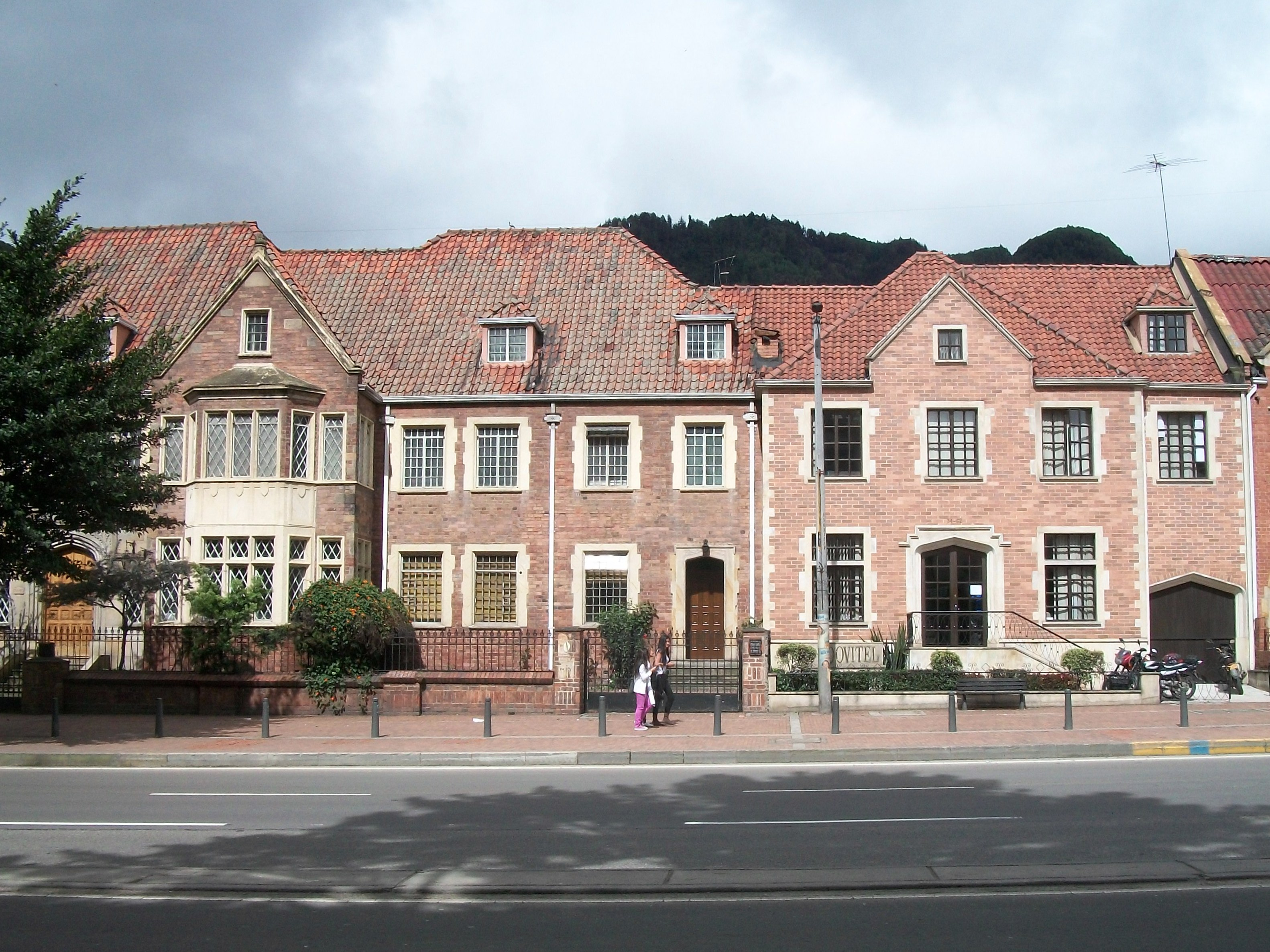 Casas en el barrio La Merced, sobre la carrera Séptima, hacia la calle Treinta y cuatro.